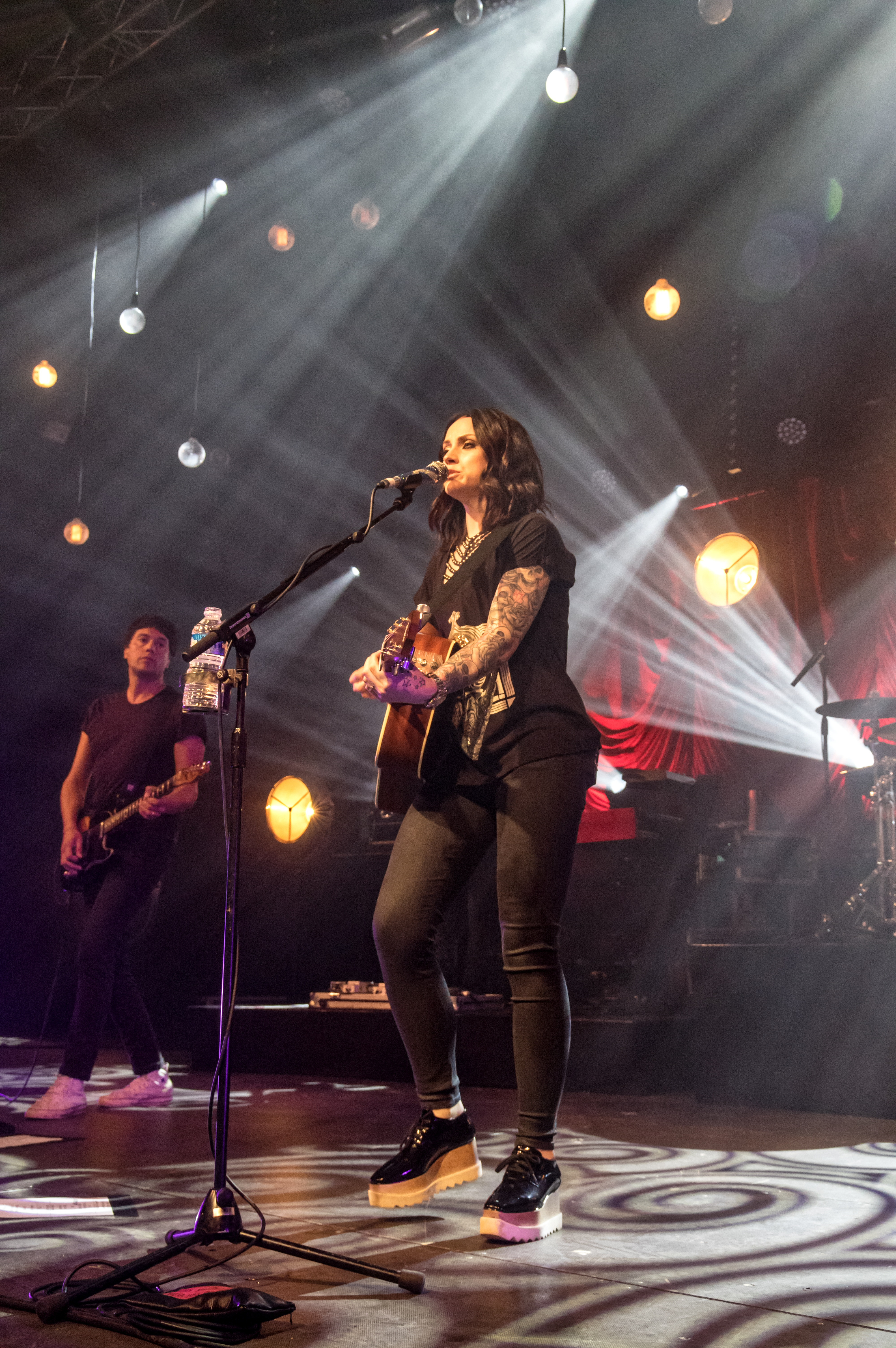 Bilder vom Zelt Musik Festival 2017 in Freiburg im Breisgau